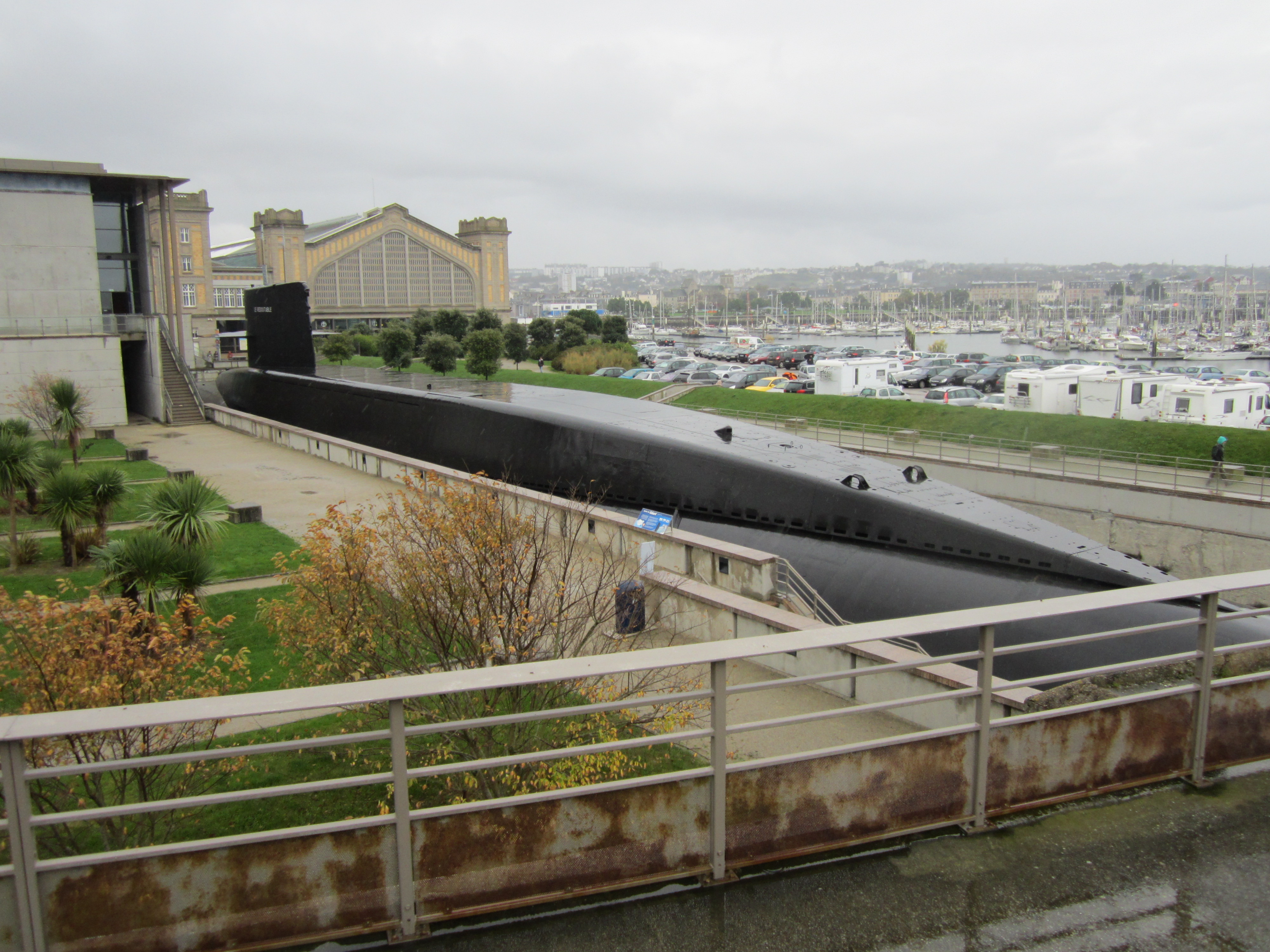 Le Redoutable (S611)